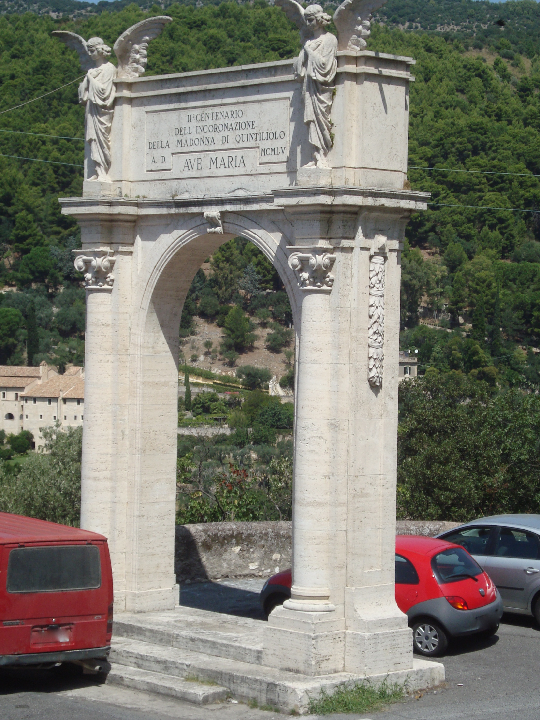 L'arc Madonna di Quintiliolo à la sortie de Tivoli